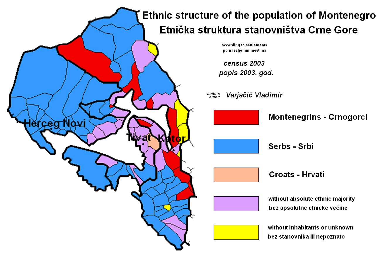 From Autor Varjacic Vladimir